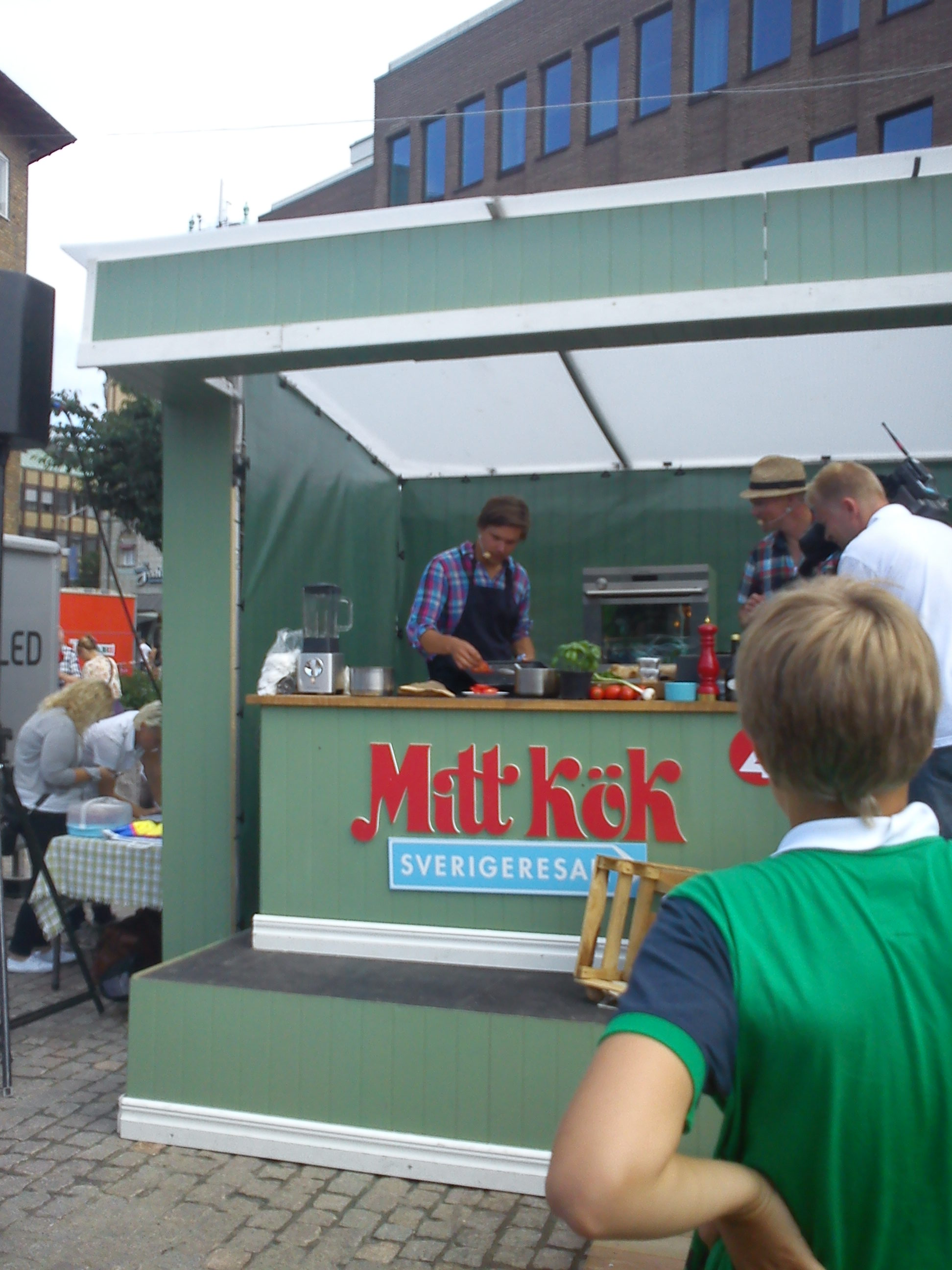 Den svenske kocken Tommy Myllymäki lagar mat framför publik på en marknad i Jönköping.